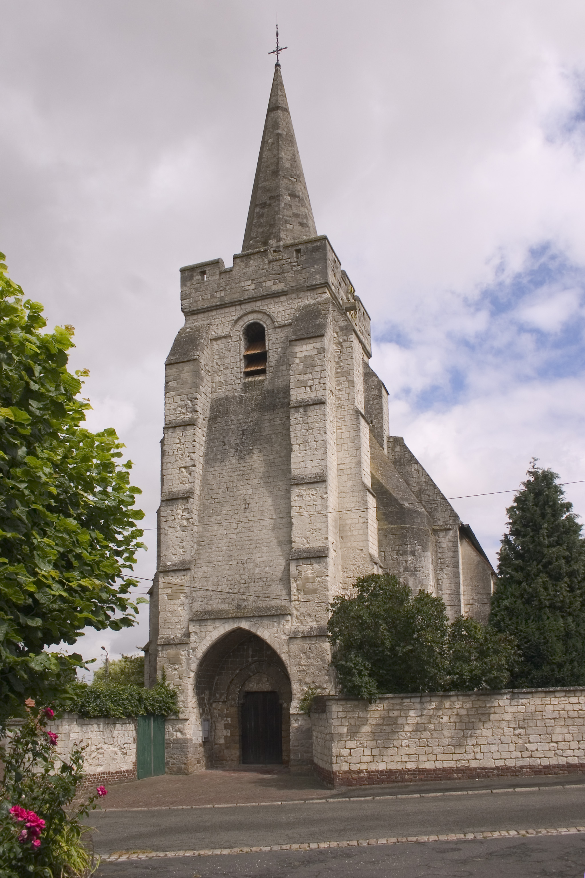 l'église d'agnez les duisans